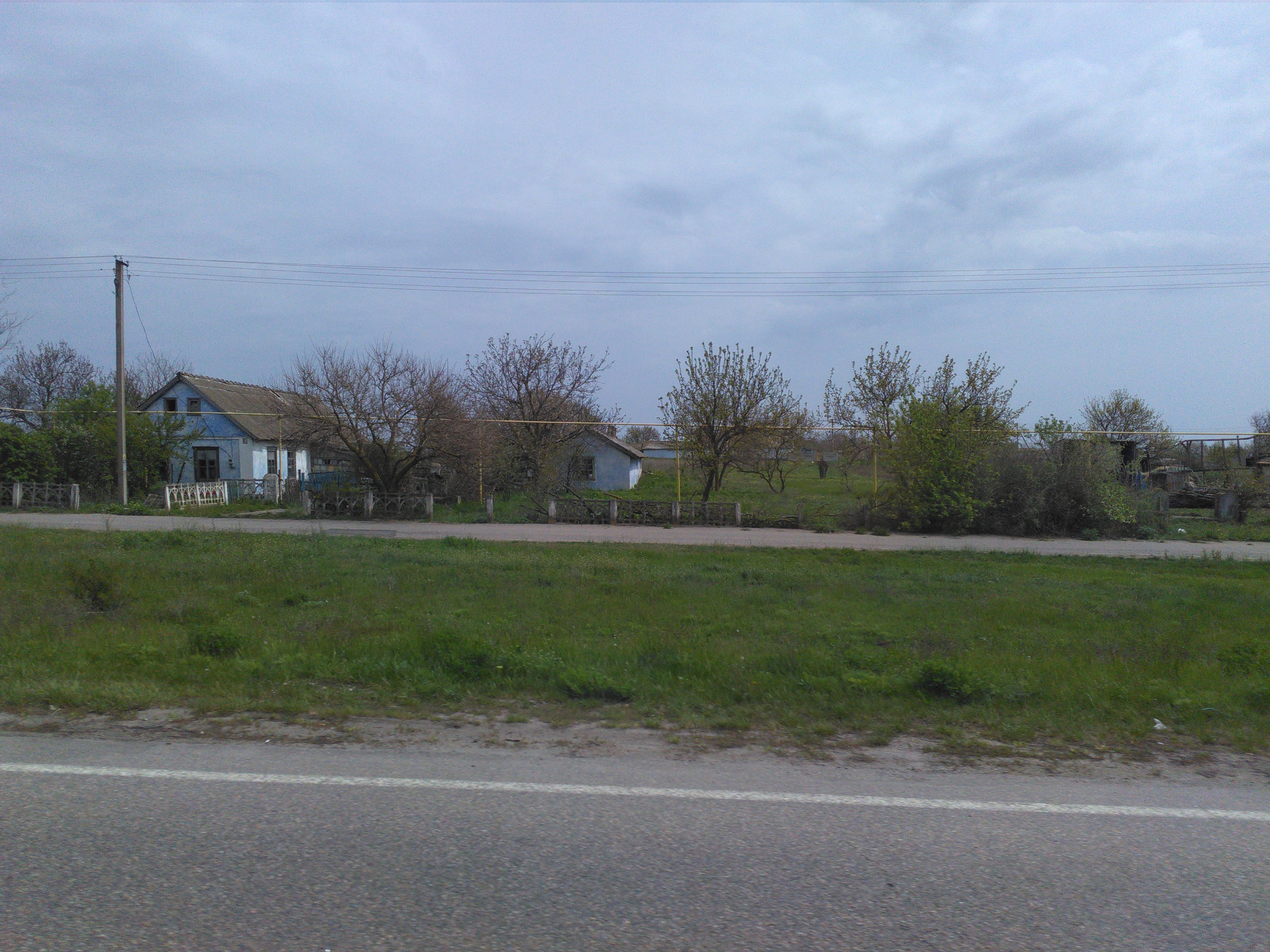 село Федорівка, Березанський район